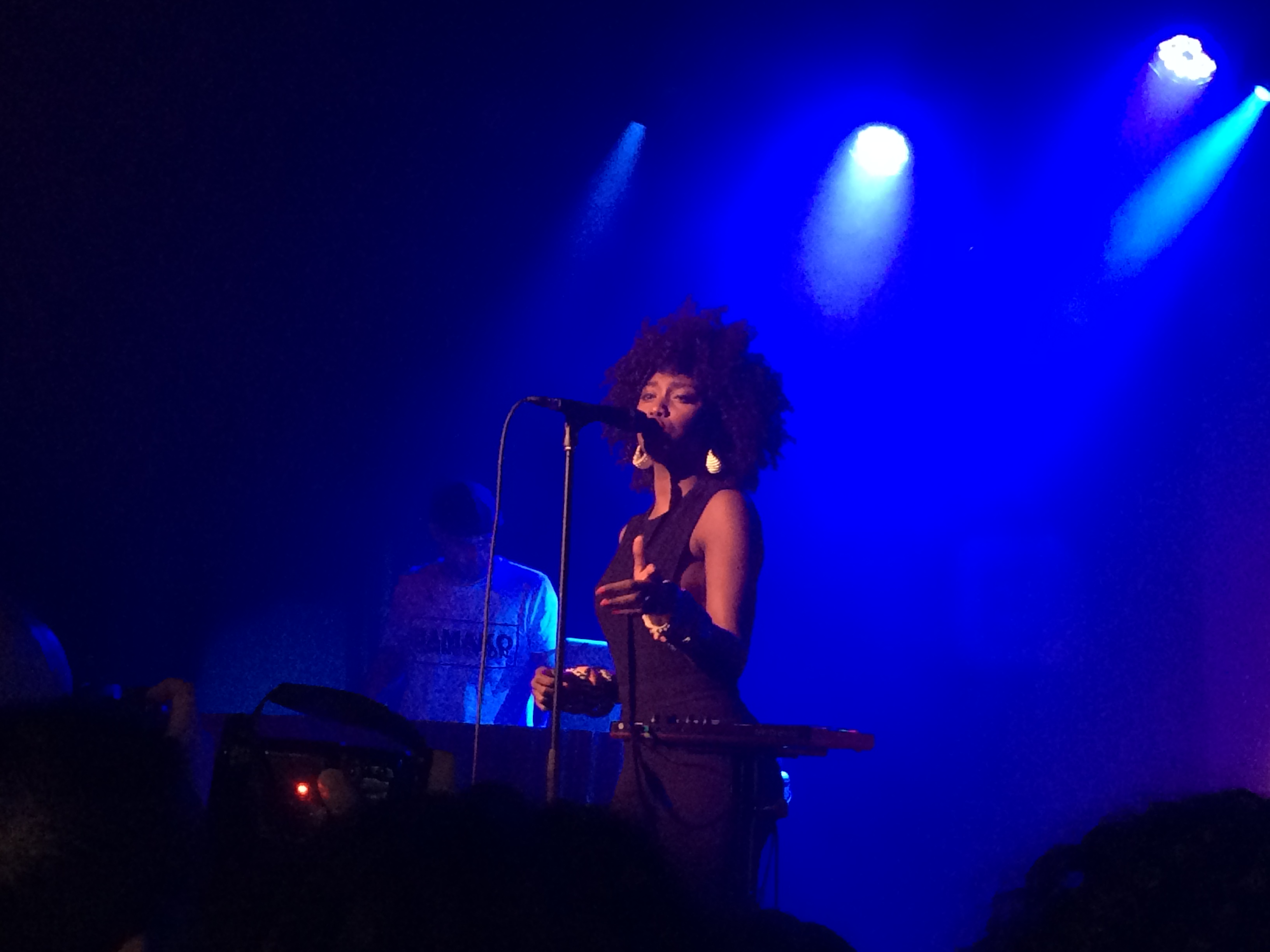 Inna Modja en concert au Pan Piper (Paris) le 16 avril 2016